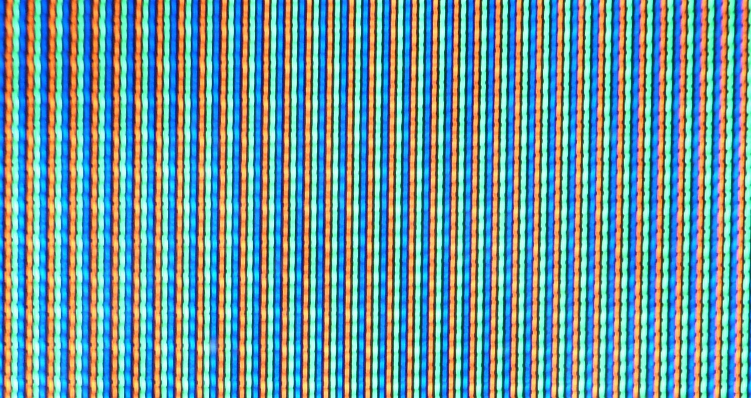 Luminophores fortement grossis d'un tube cathodique de téléviseur 70 cm.